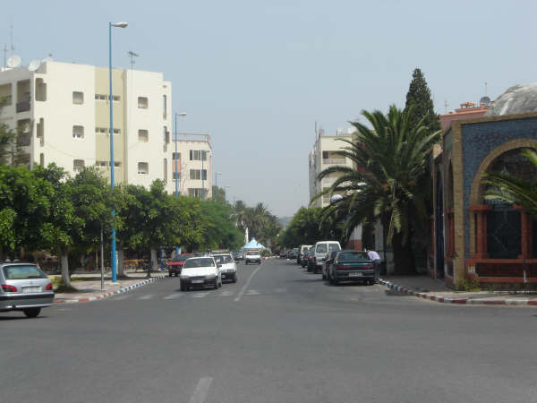 Plateau2.